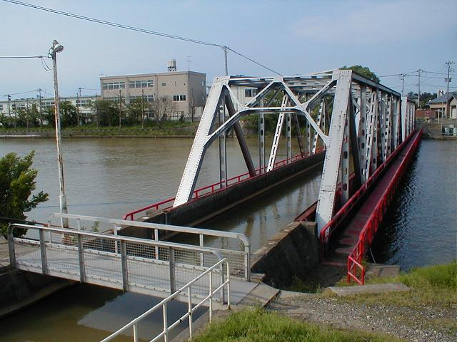 新潟市の新川に架かる西川の水路橋。